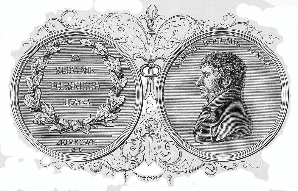 Rycina złotego medalu nadanego Samuelowi Lindemu za Słownik języka polskiego: Tygodnik Ilustrowany, 1864, nr 252, s. 272.